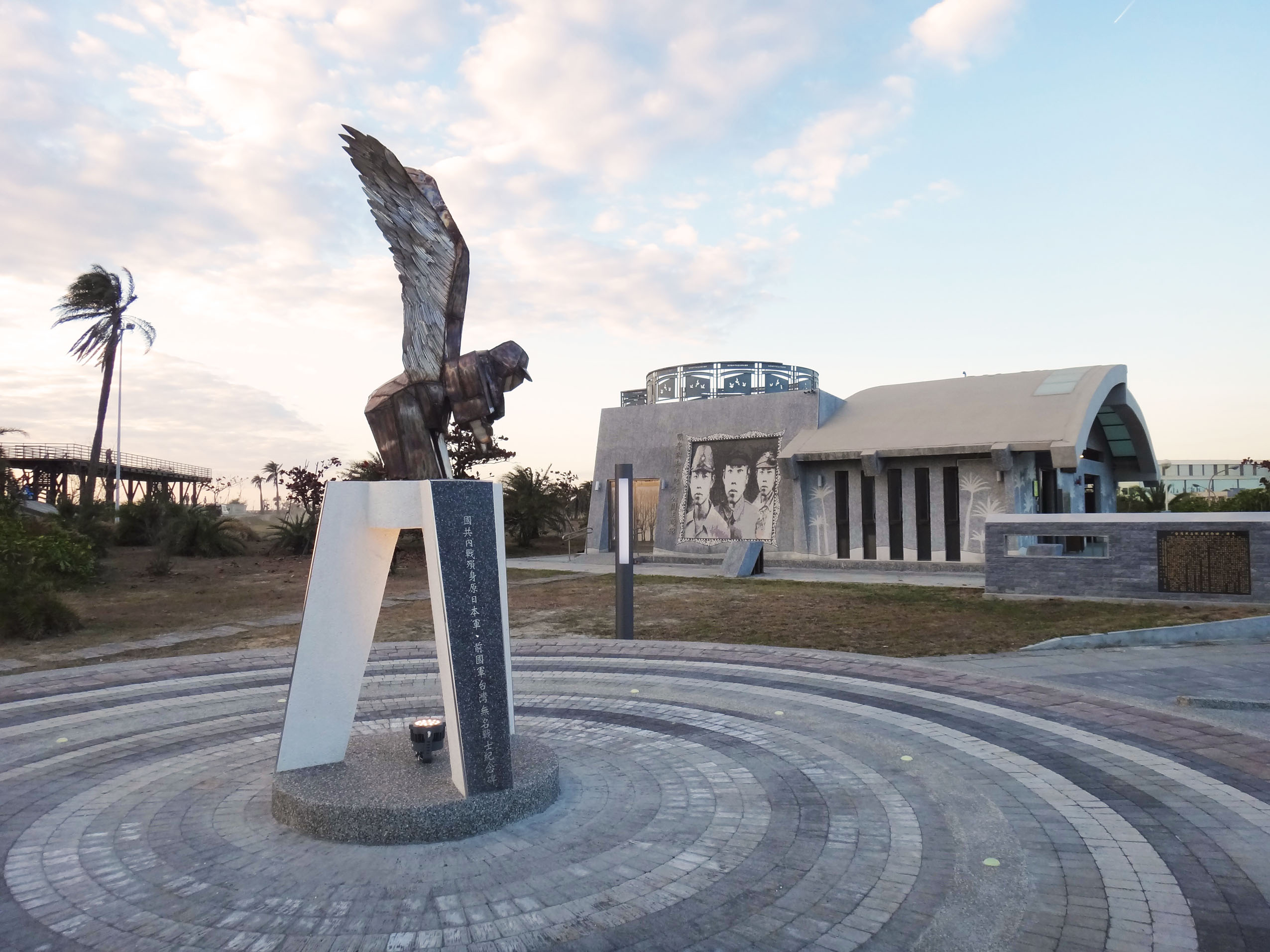 高雄市戰爭與和平紀念公園主題館與「飛鄉」紀念碑。